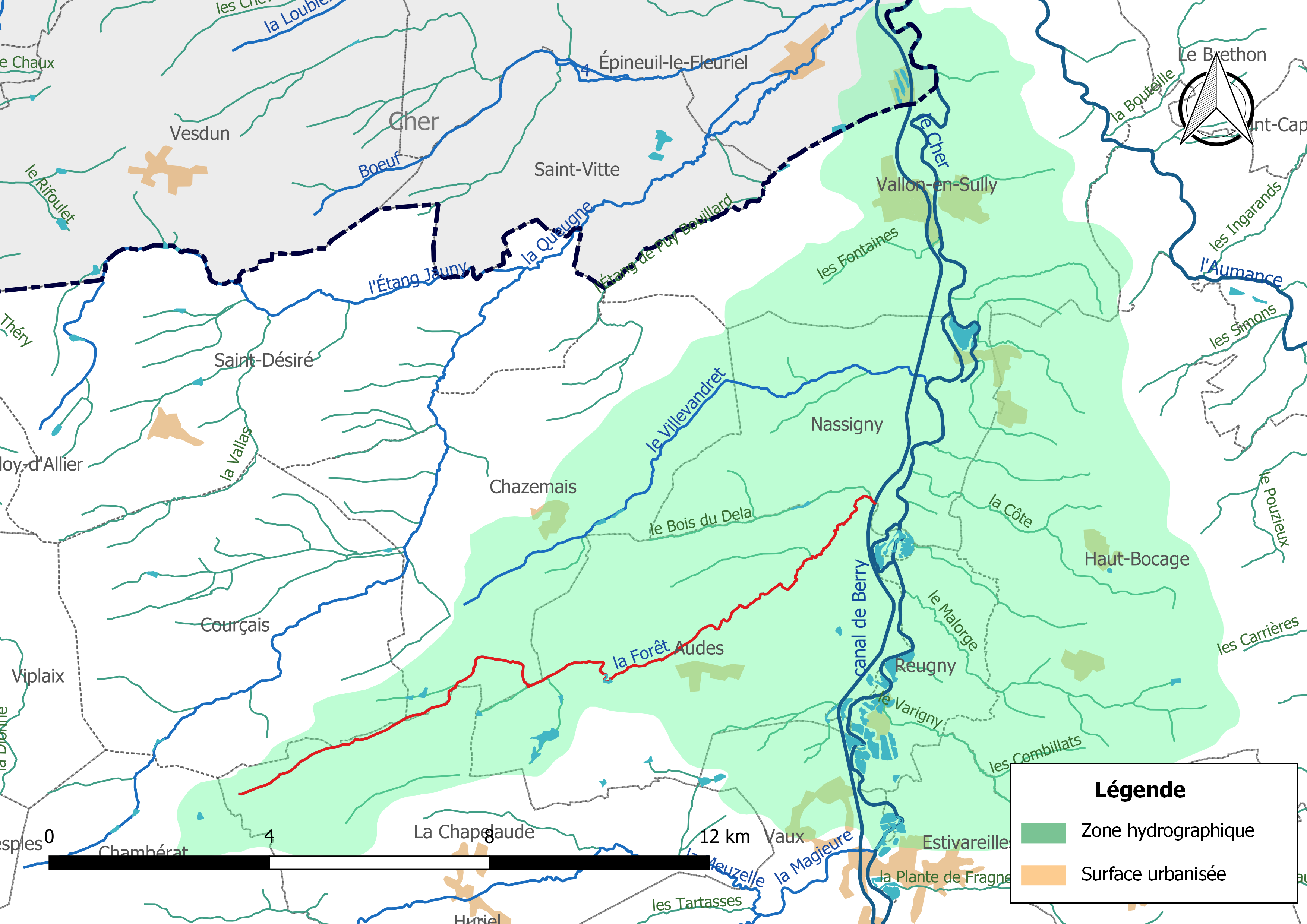 Carte du cours d'eau « la Forêt » (France) et de la zone hydrographique dans laquelle il s'insère.